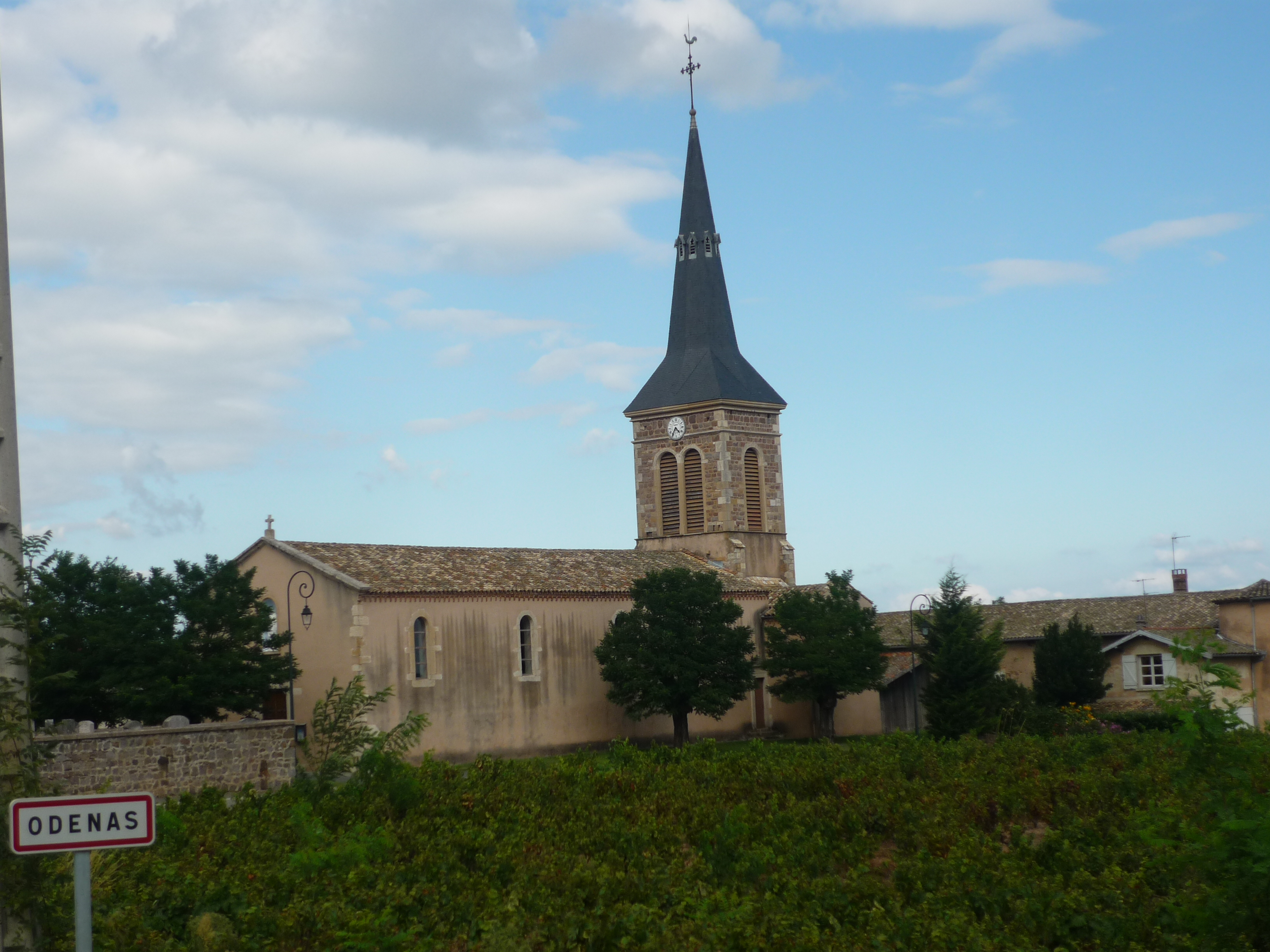 Église de la commune d'Odenas dans le département du Rhône